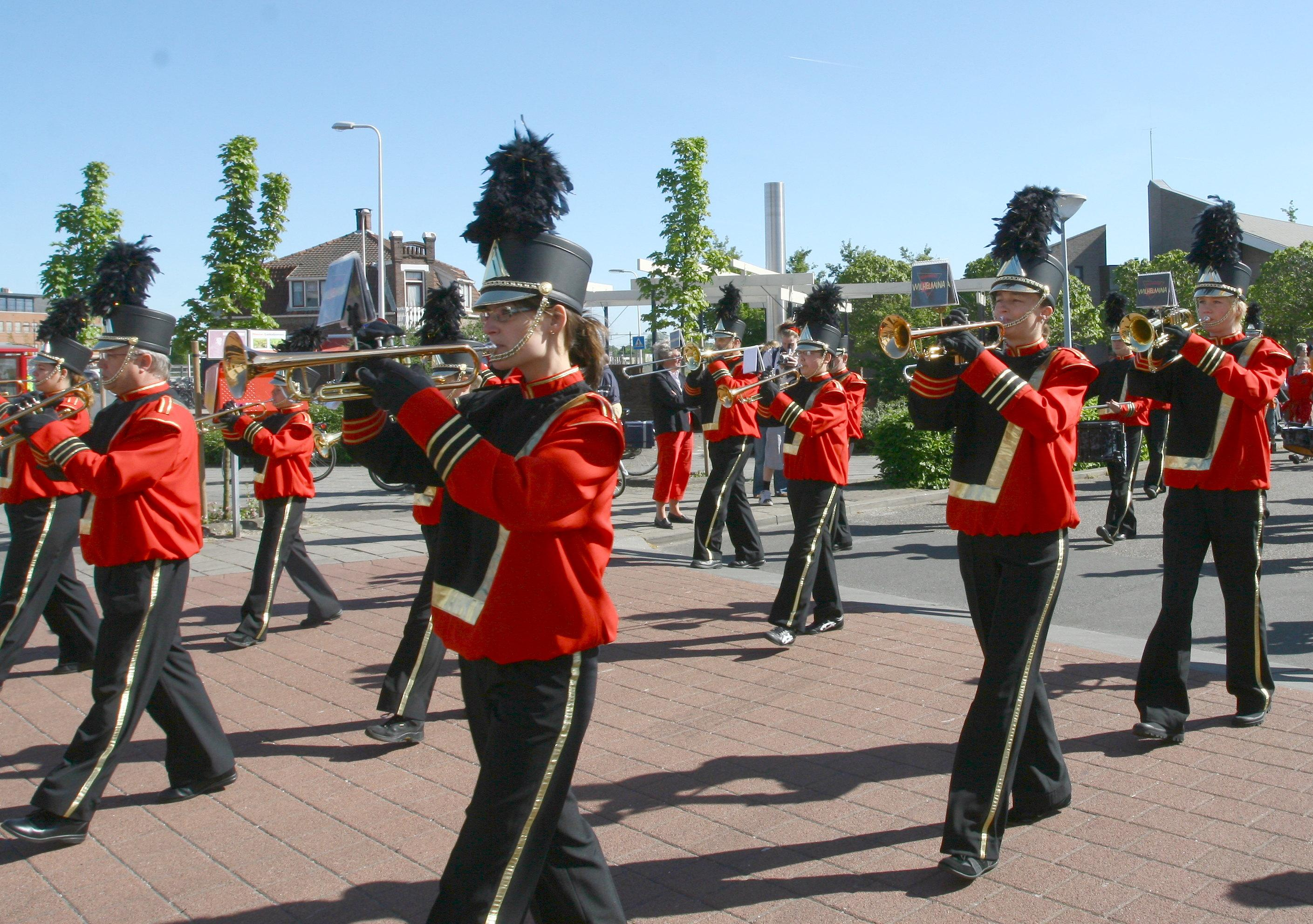 Showkorps Wihelmina uit Rijssen.